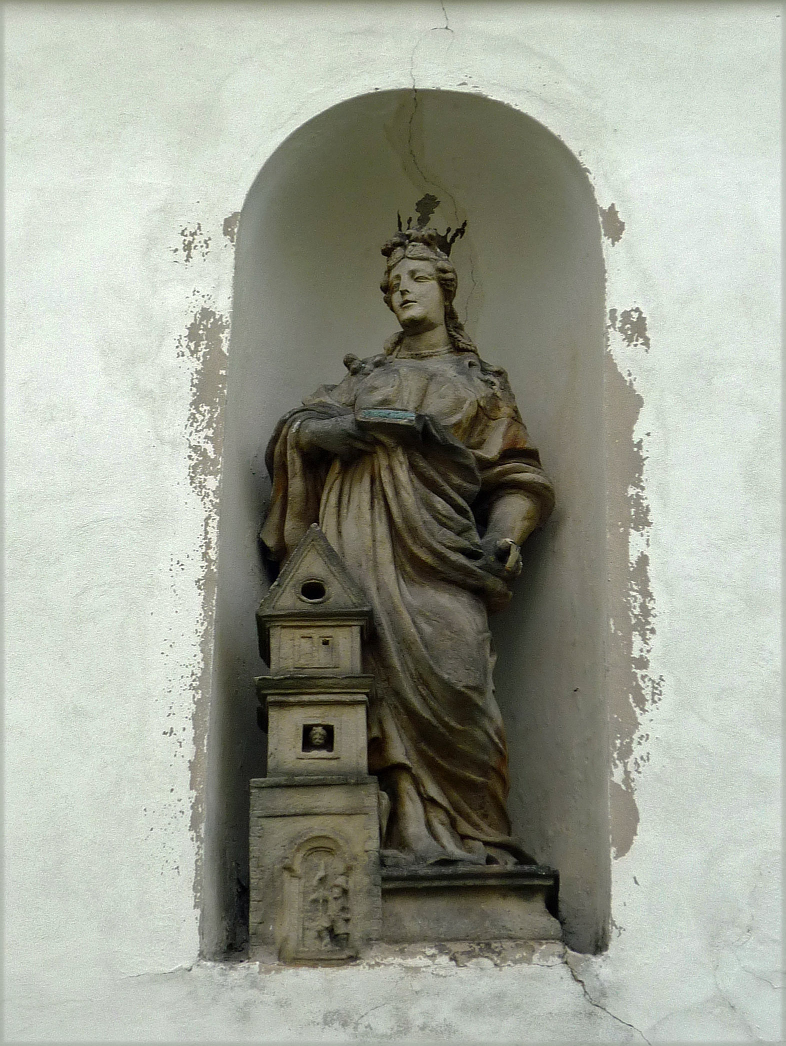 Hl.Barbara am Dubitzer Kirchlein im Böhmischen Mittelgebirge